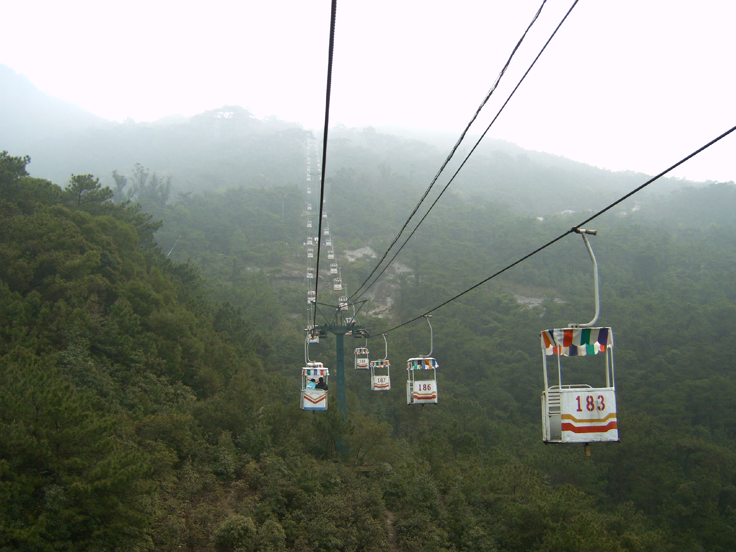 Seilbahn zum Gipfel des Gushan